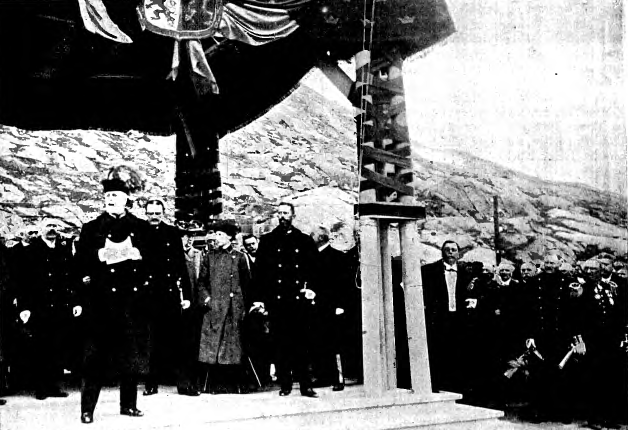 Kong Oscar II åpner Ofotbanen (Lapplandsbanen) på riksgrensen 14. juli 1903.